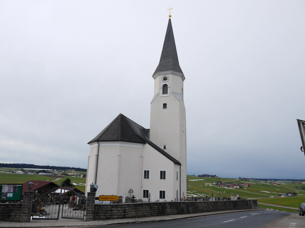 Kath. Pfarrkirche hl. Maximilian mit Friedhof